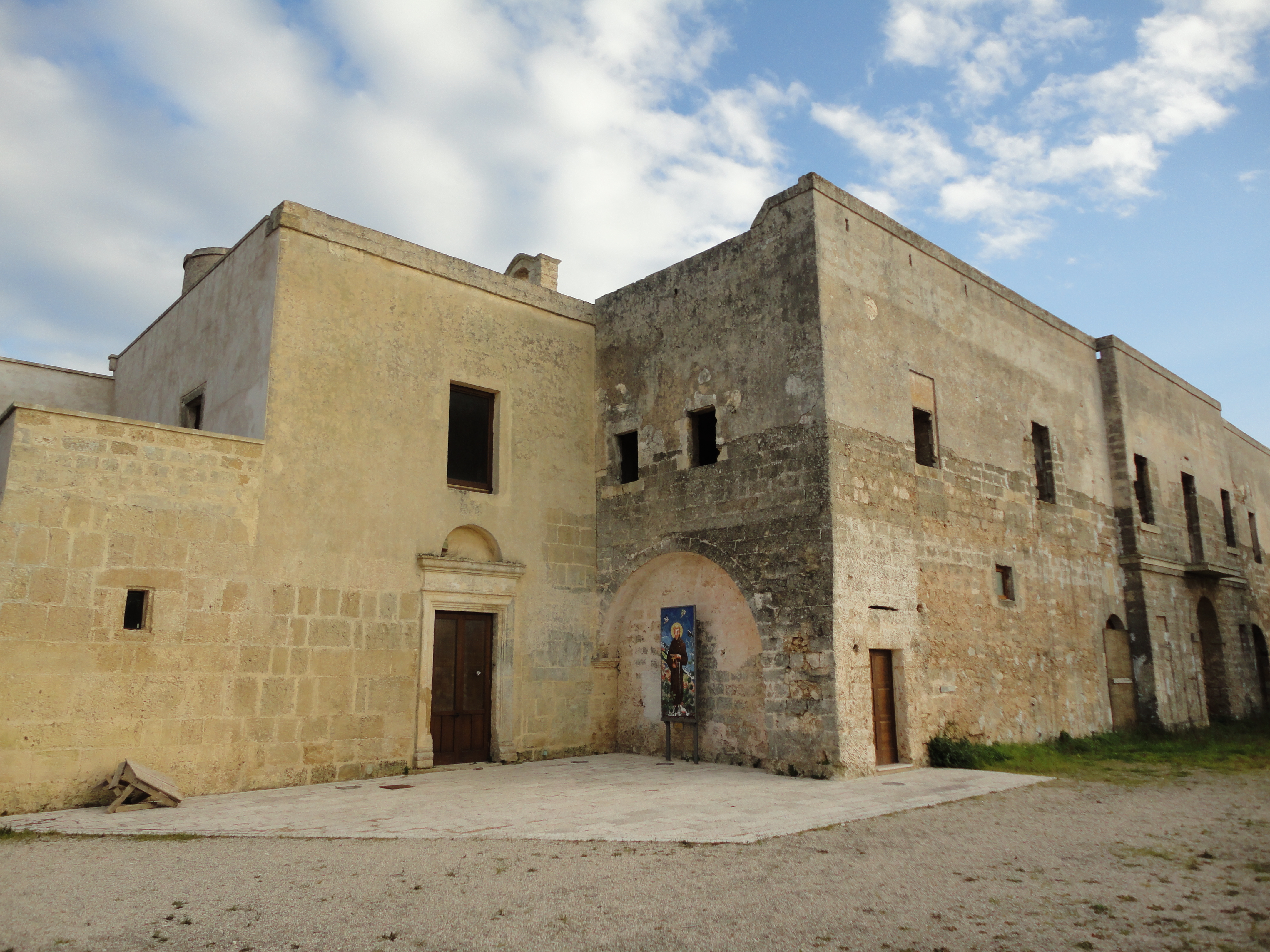 Poggio di Sant'Elia Squinzano-Trepuzzi-Campi Salentina, Lecce